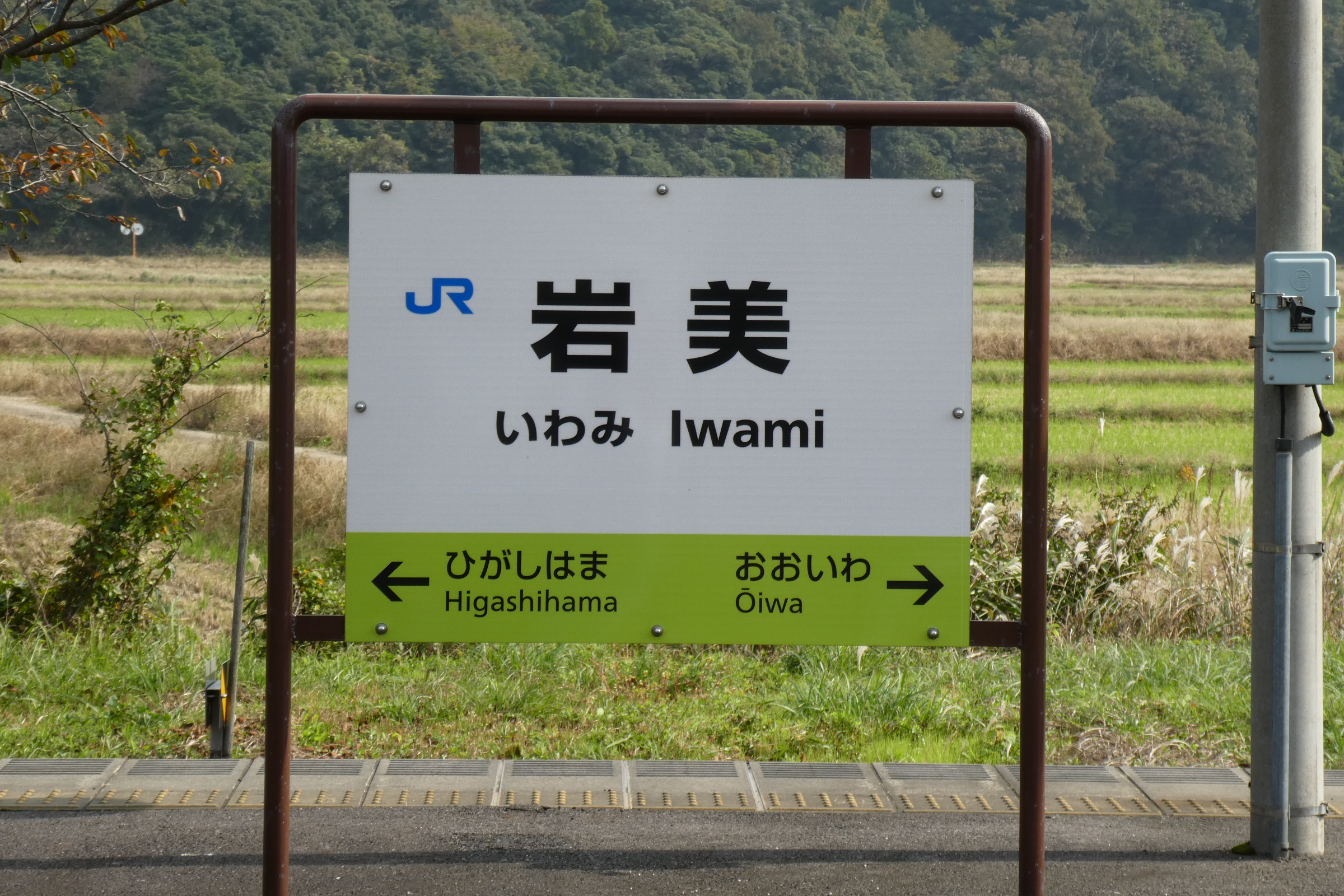 山陰本線 岩美駅 駅名標